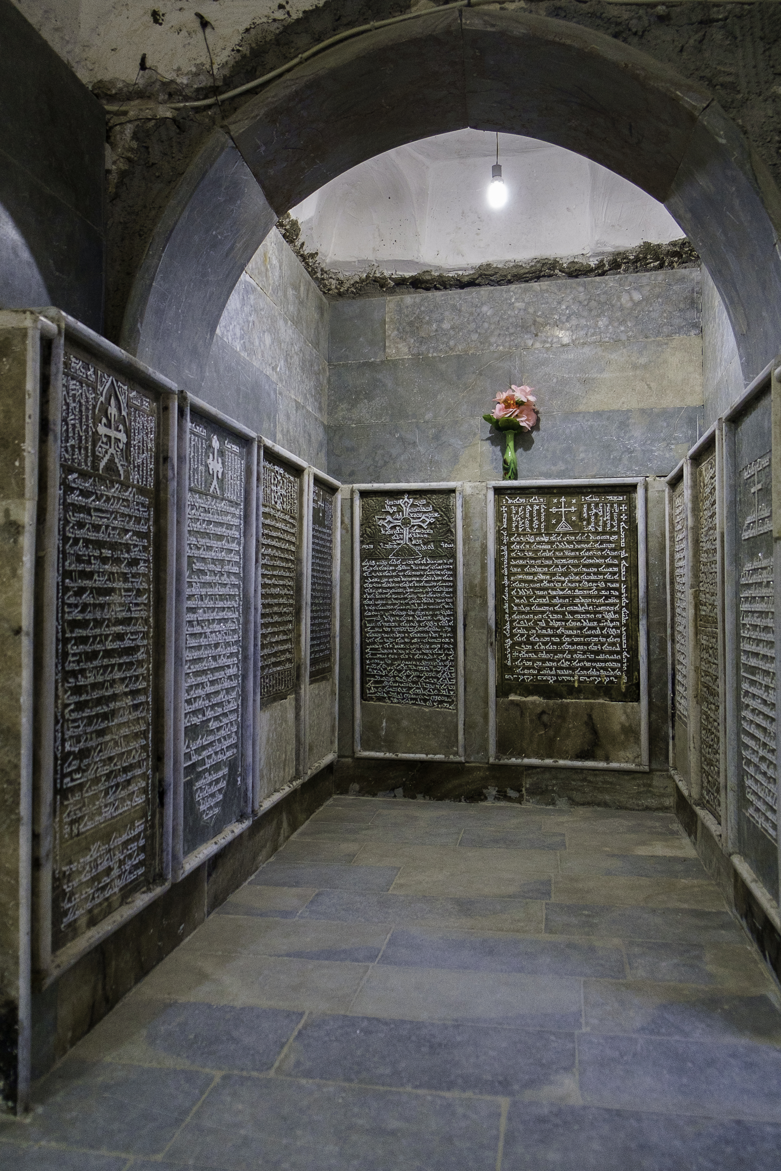 Corridor with patriarchal graves, dating from 1497 to 1804, in Rabban Hormizd Monastery